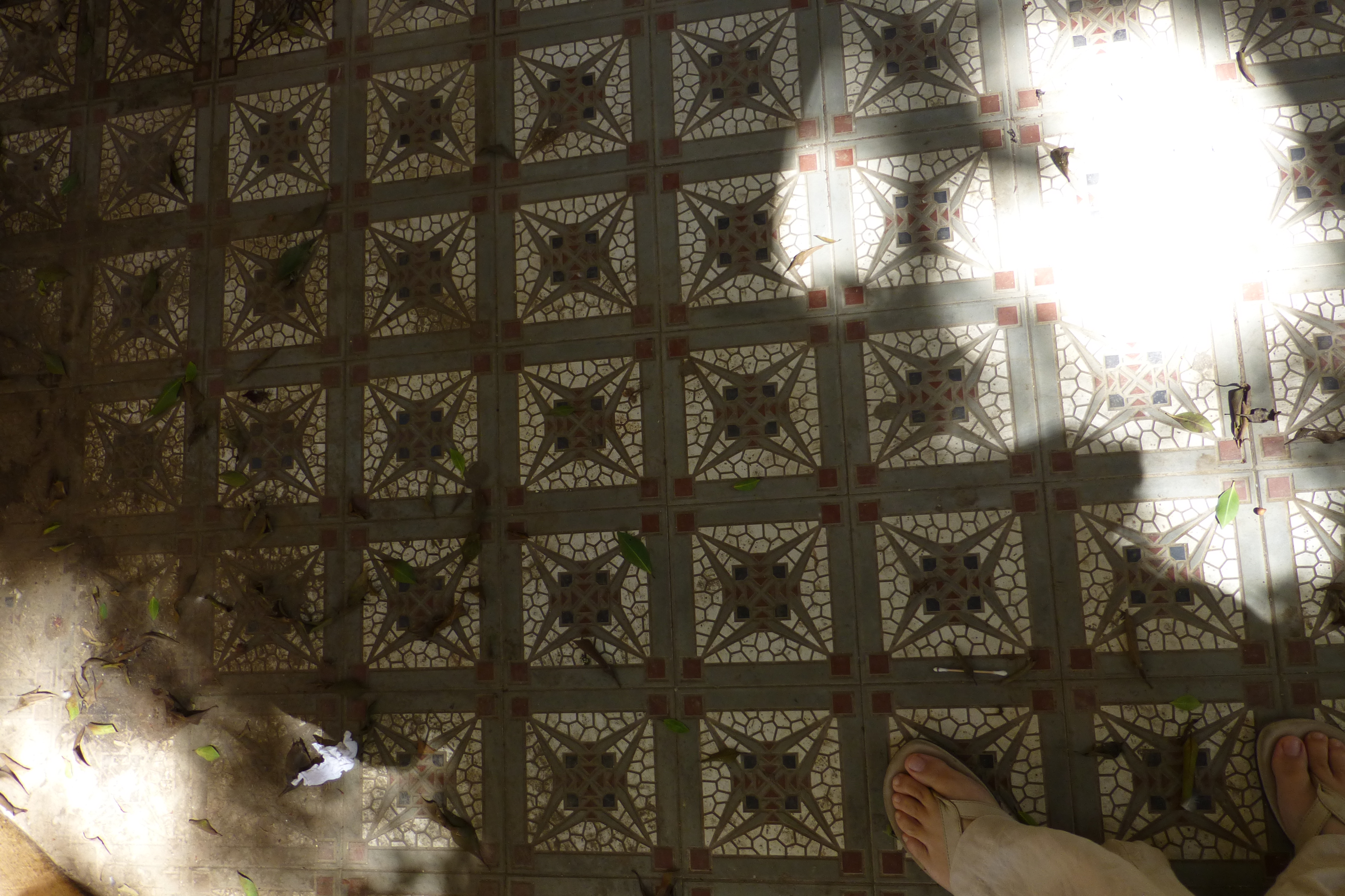 רח' מונטיפיורי 3, פתח תקווה